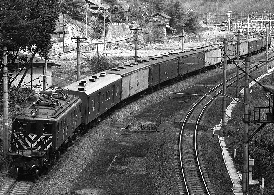 山陽本線 瀬野-八本松間で荷物列車の後補機運用中の 国鉄EF59 21